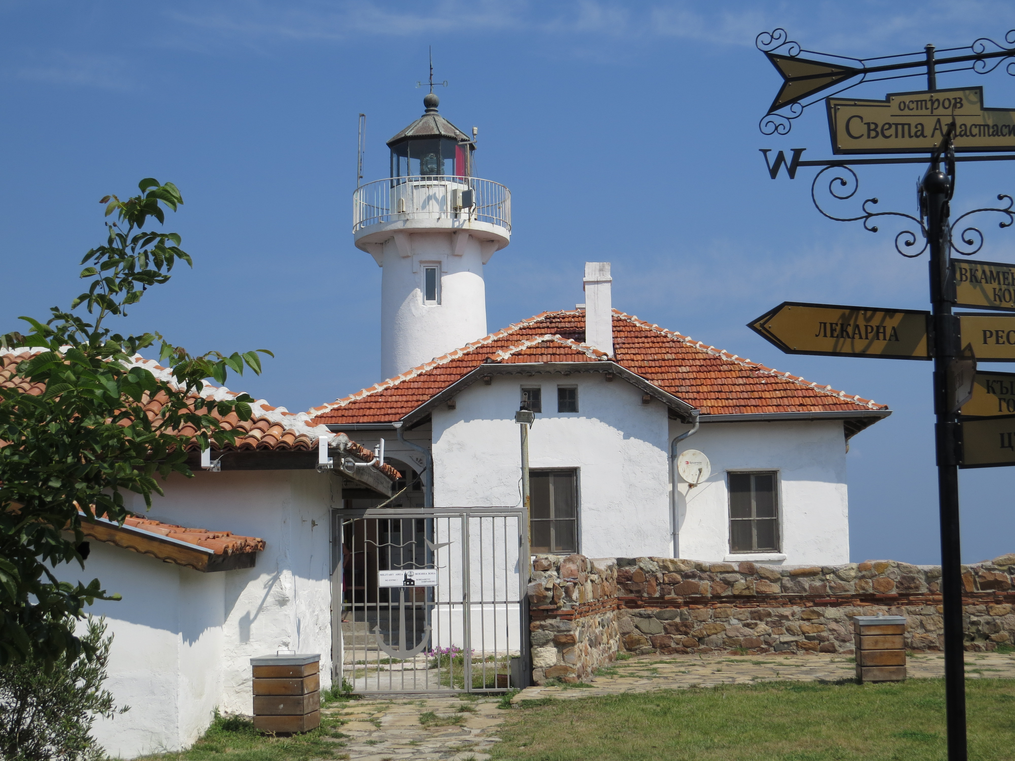 Маяк на острове Святой Анастасии